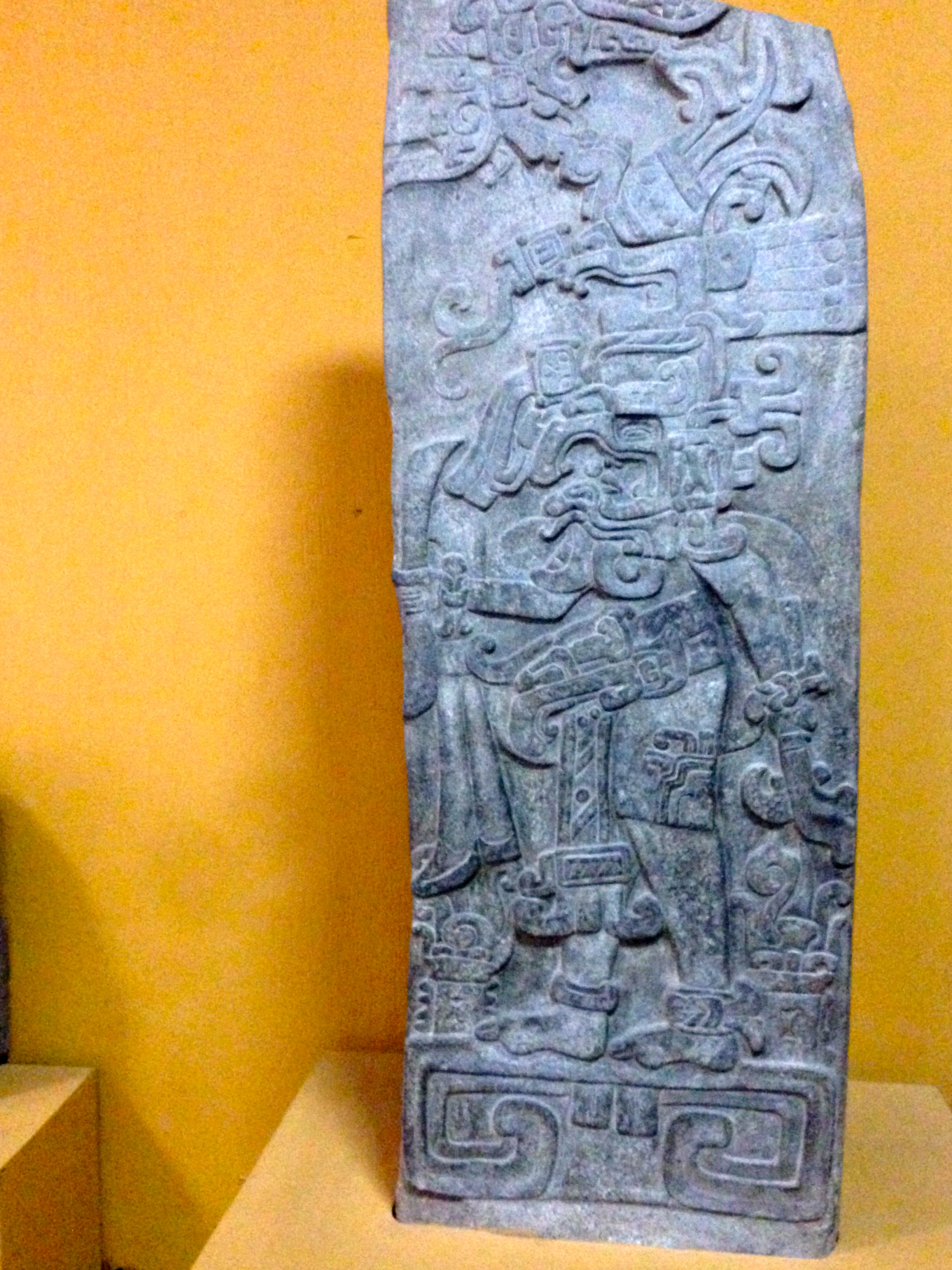 Stele Nationalmuseum für Archäologie und Ethnologie, Guatemala